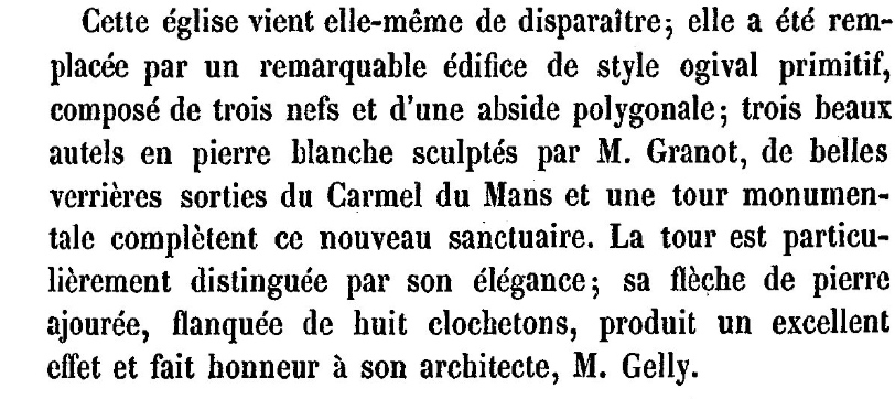 Description par Amédée Guillotin de Corson (dans "Pouillé historique de l'archevêché de Rennes", tome 5, 1880-1886) de la nouvelle église Saint-Martin du Pertre, construite entre 1863 et 1873.